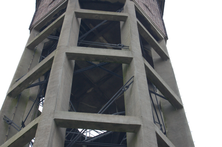 Detailaufnahme Wasserturm Uetersen